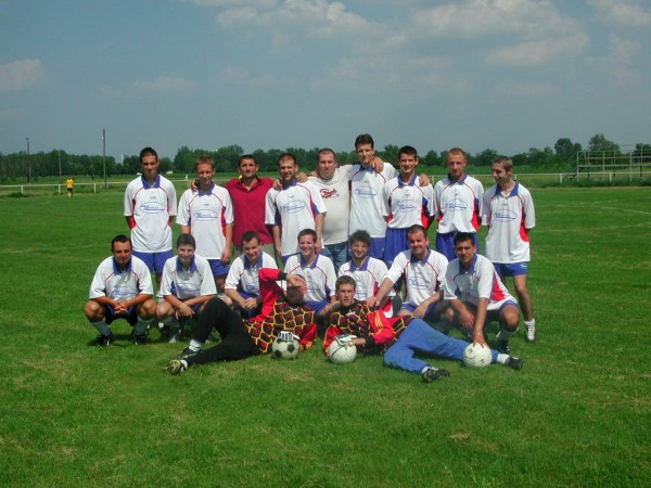 Ezüst-2003